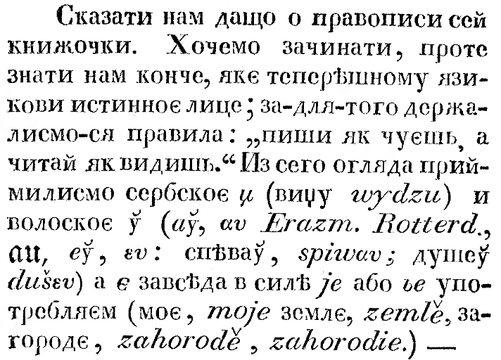 Беларуская (тарашкевіца): Прыклад ужываньня літары ў у Русалцы Днестровай.